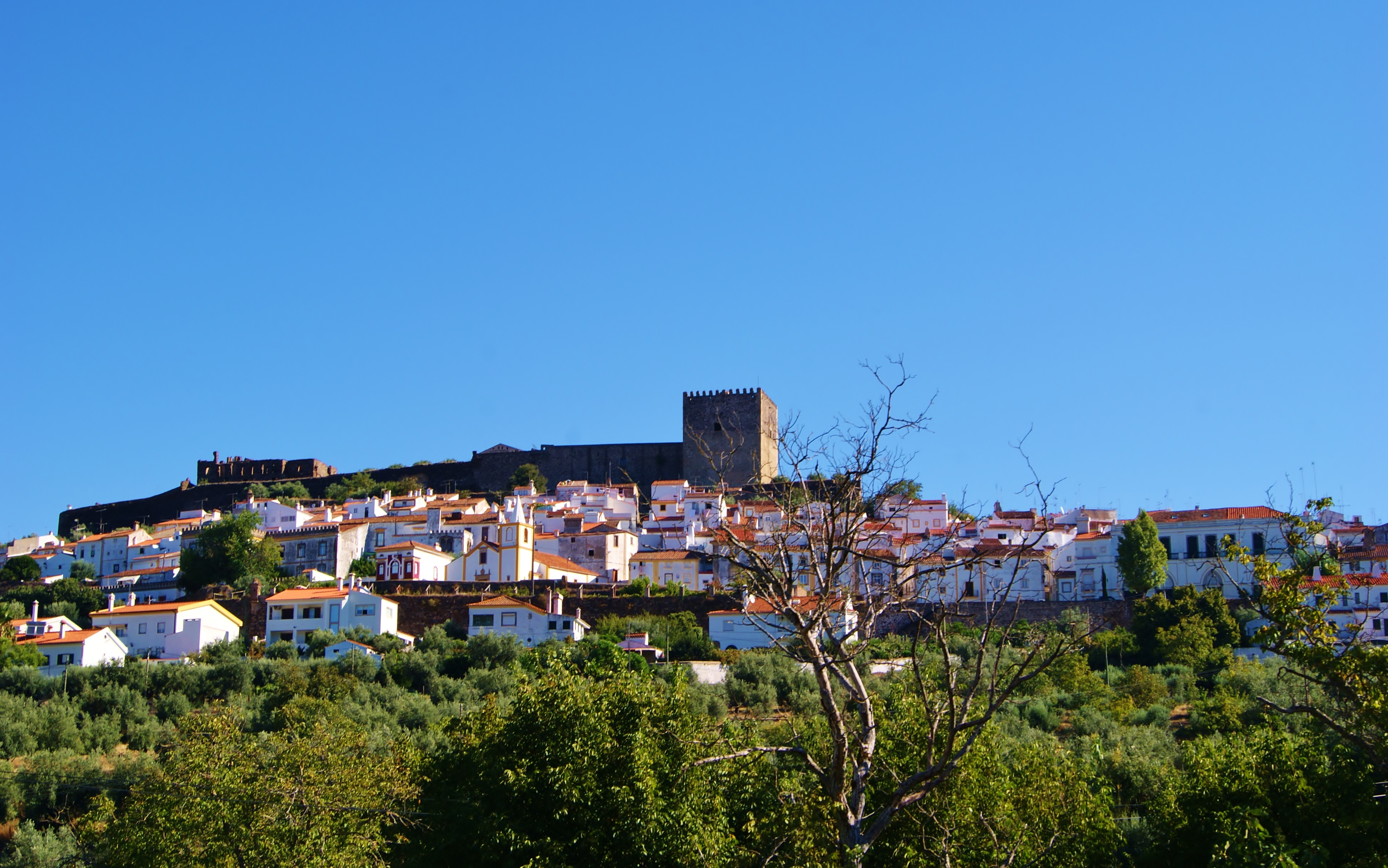 Panorâmica da freguesia de Santa Maria da Devesa, com o castelo ao fundo. This file was uploaded for Wiki Loves Monuments in Portugal with the unique identifier 70446.